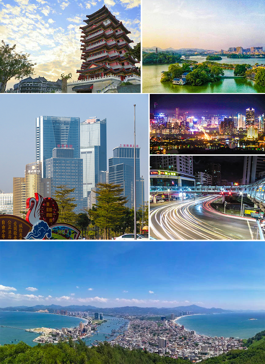 Montage of various Huizhou images